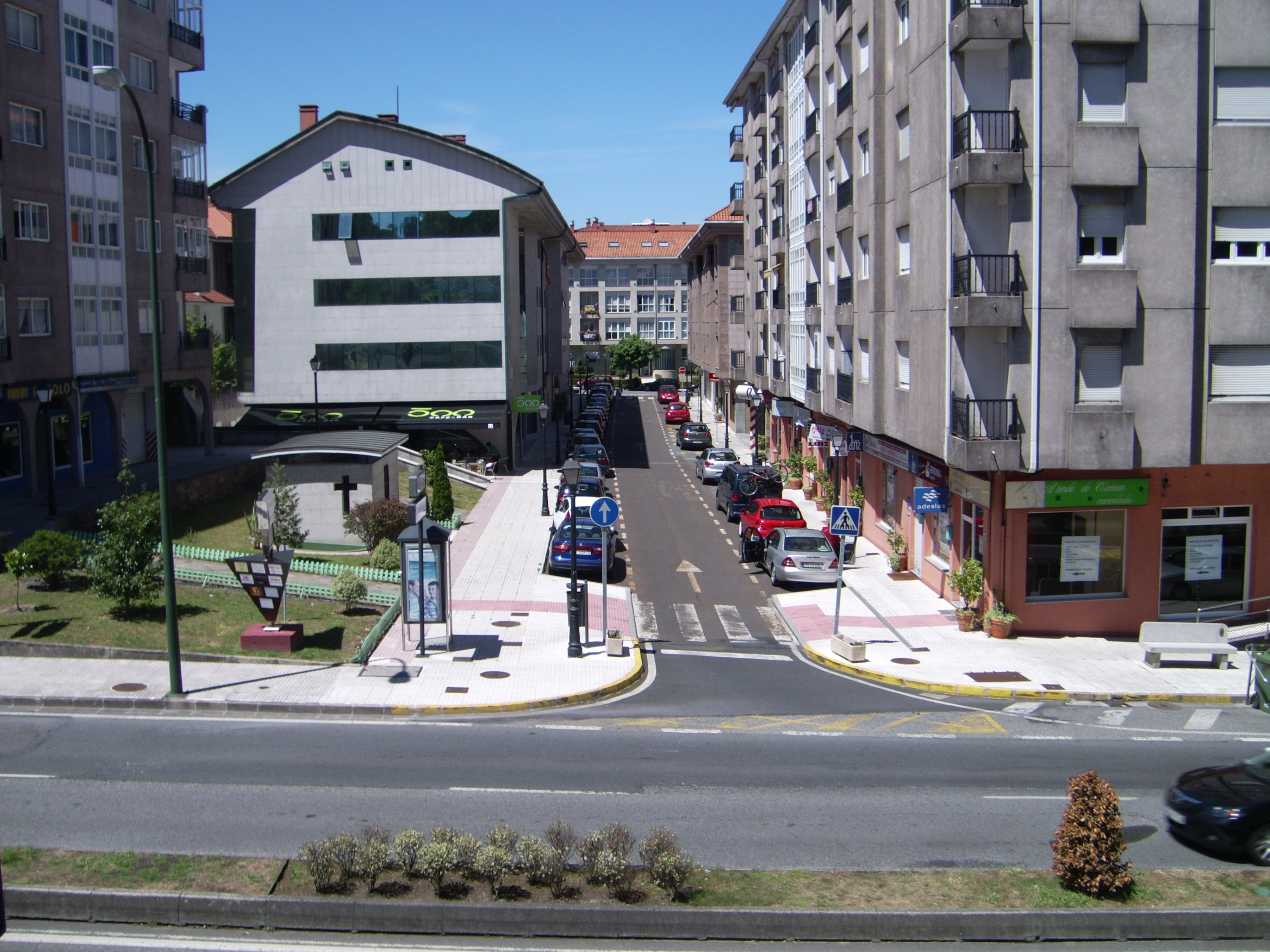 Rúa Viorneira dende Rosalía de Castro, O Milladoiro